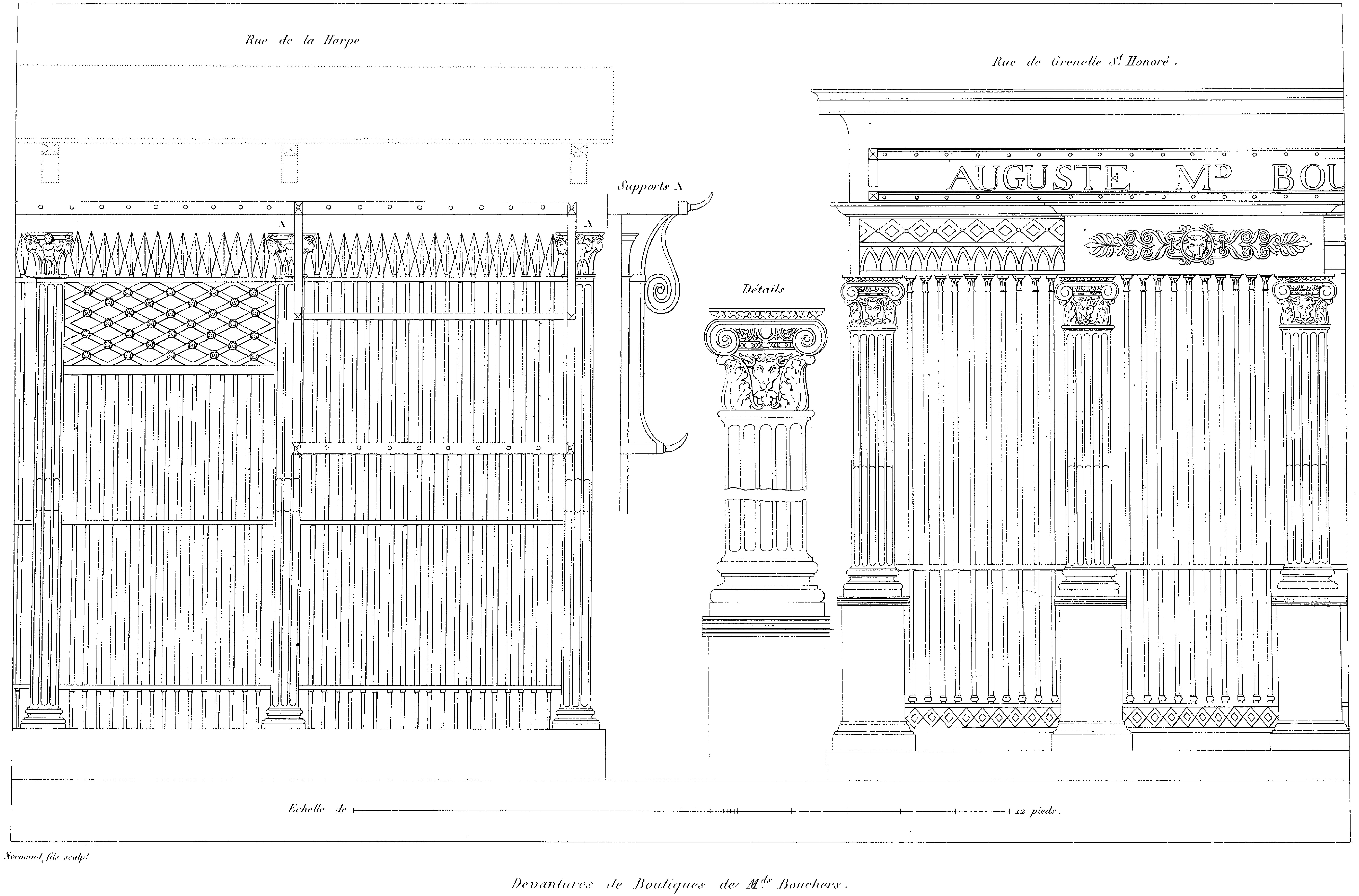 La première devanture de boutique de marchand boucher qu’offre cette planche se trouve rue de la Harpe. Elle est d’une disposition simple et convenable ; on y remarquera l’agencement des supports dont on a donné le profil à côté. L’autre, située rue de Grenelle St.-Honoré, est d’une composition plus riche ; la proportion en semblerait un peu lourde dans tout autre cas ; mais ici elle est tolérable. Les détails en sont de bon choix et les chapiteaux bien adaptés au sujet. Ils sortent probablement d’une de ces fabriques qui se sont multipliées depuis quelques années, dans lesquelles s’exécutent des ornemens de toute espèce, pris sur de bons modèles, qui permettent aujourd’hui de décorer à peu de frais l’intérieur et l’extérieur de nos édifices.